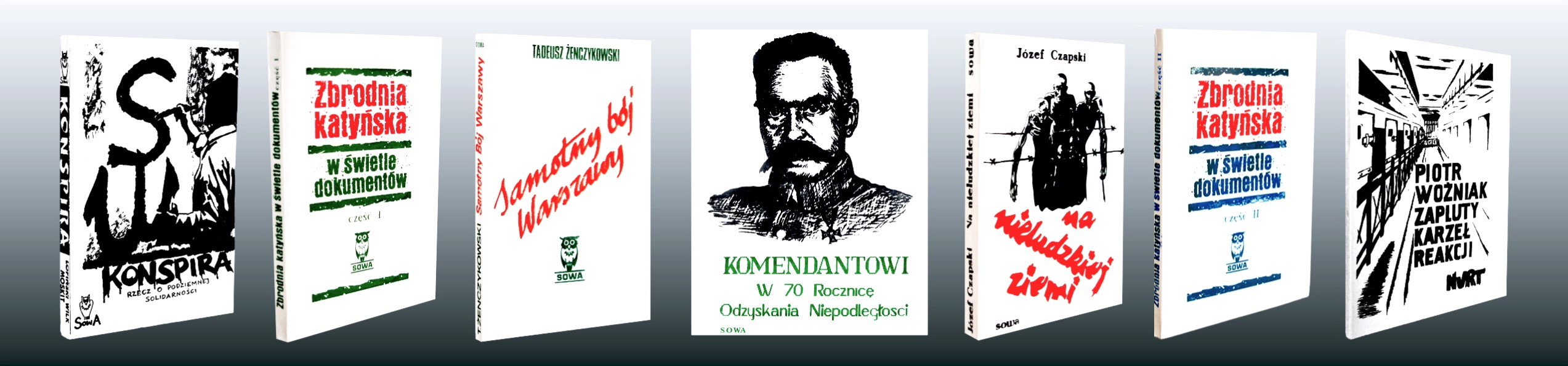 Sowa - Wizerunek ksiazek wydawanych przez SOWA w latach 80.